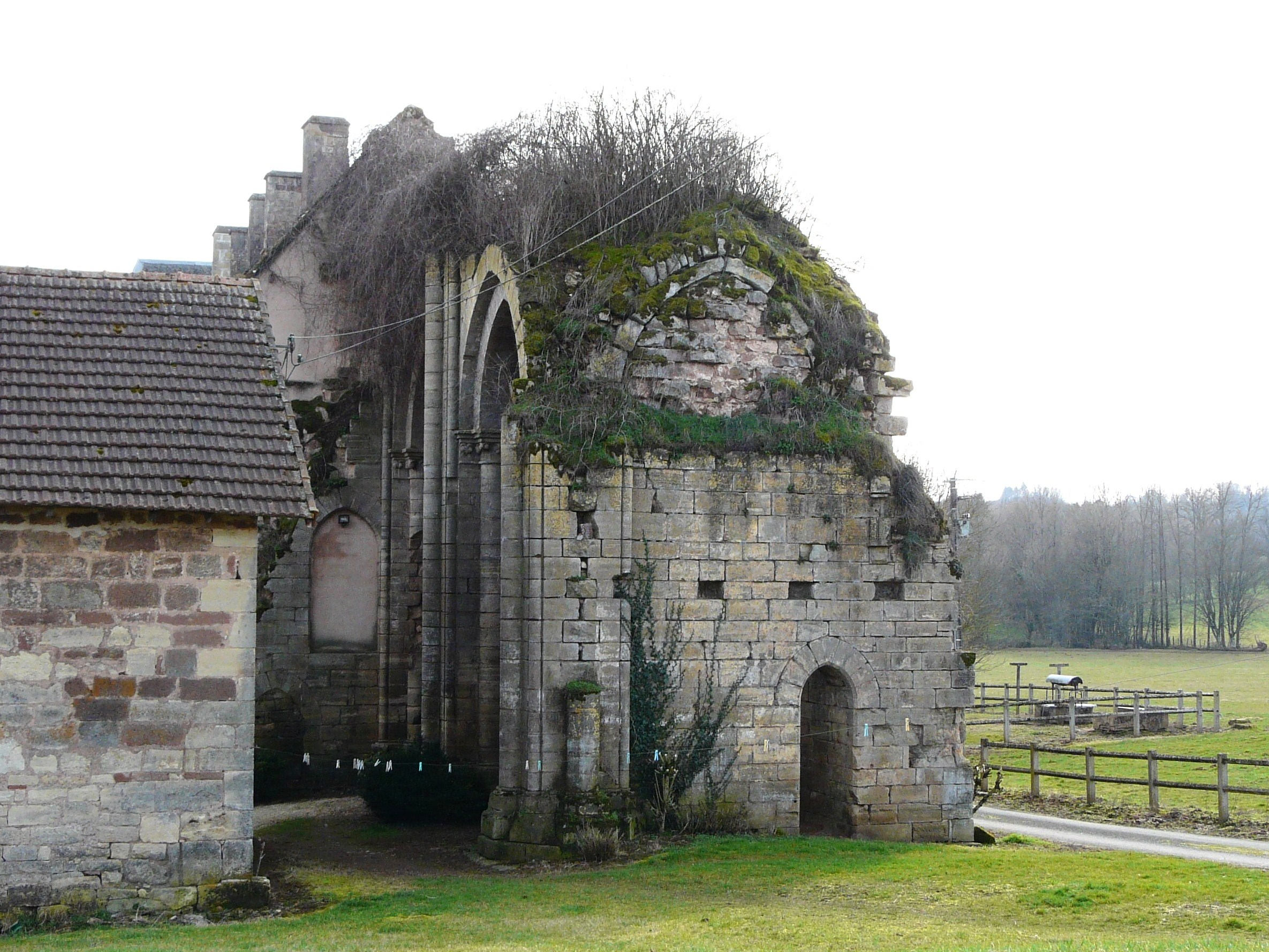 Vestiges de l'abbaye de Dalon, Sainte-Trie, Dordogne, France.